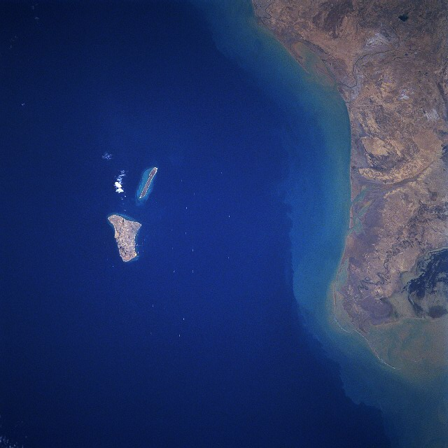 Kharg Island, Iran